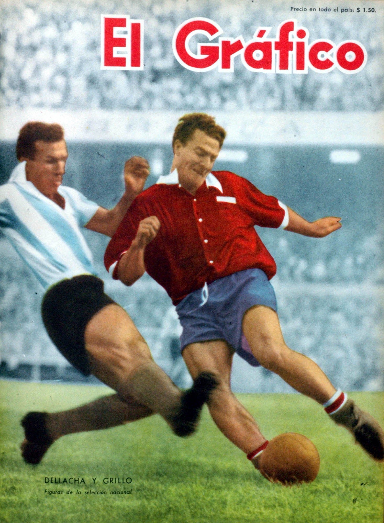 El Grafico del 18 de Junio de 1954. Edicion 1819